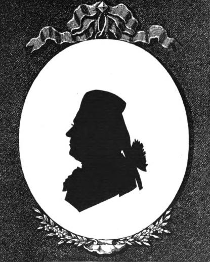 Лев Александрович Нарышкин (1733-1799), обер-шталмейстер.